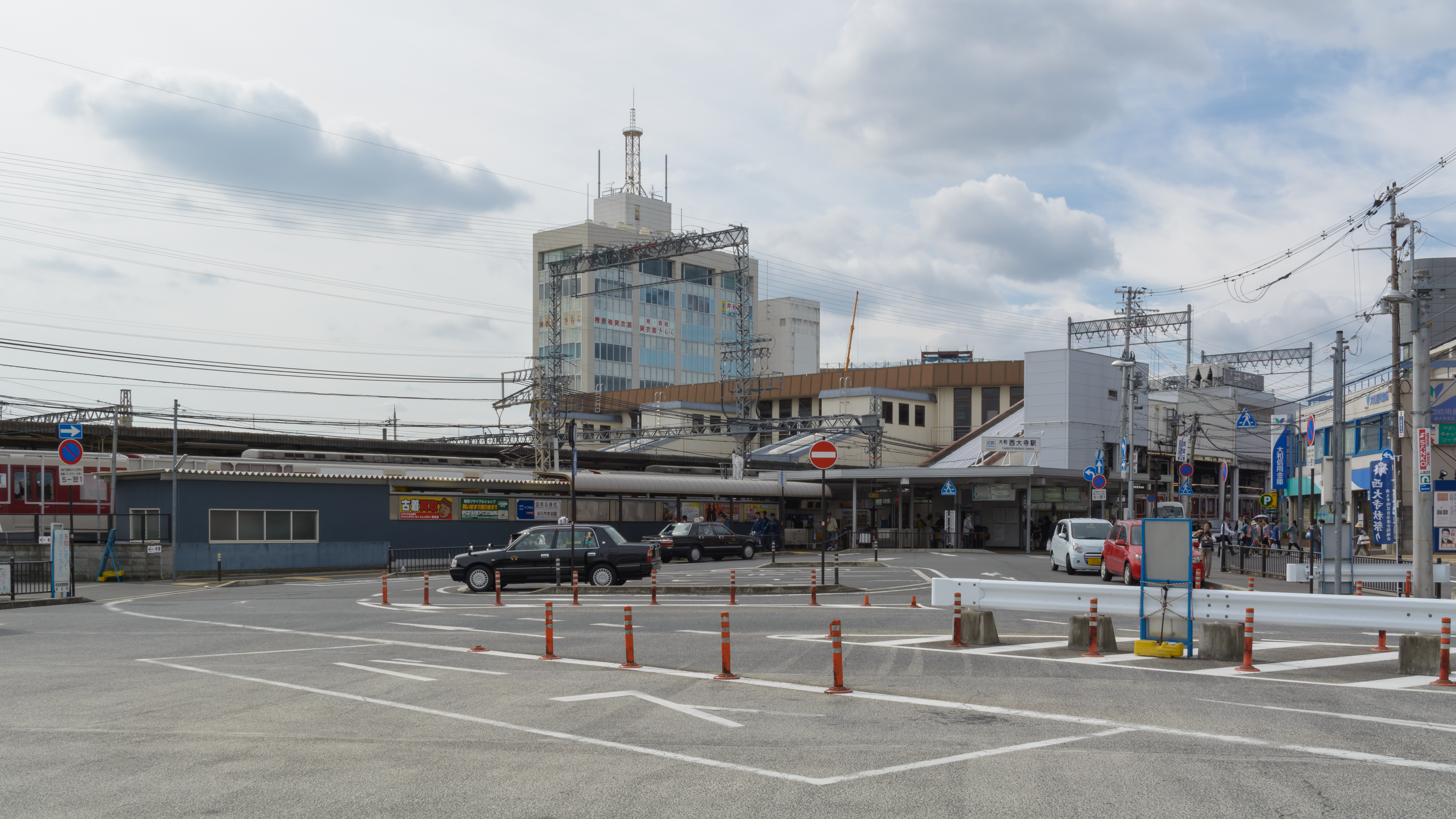 近鉄大和西大寺駅北口